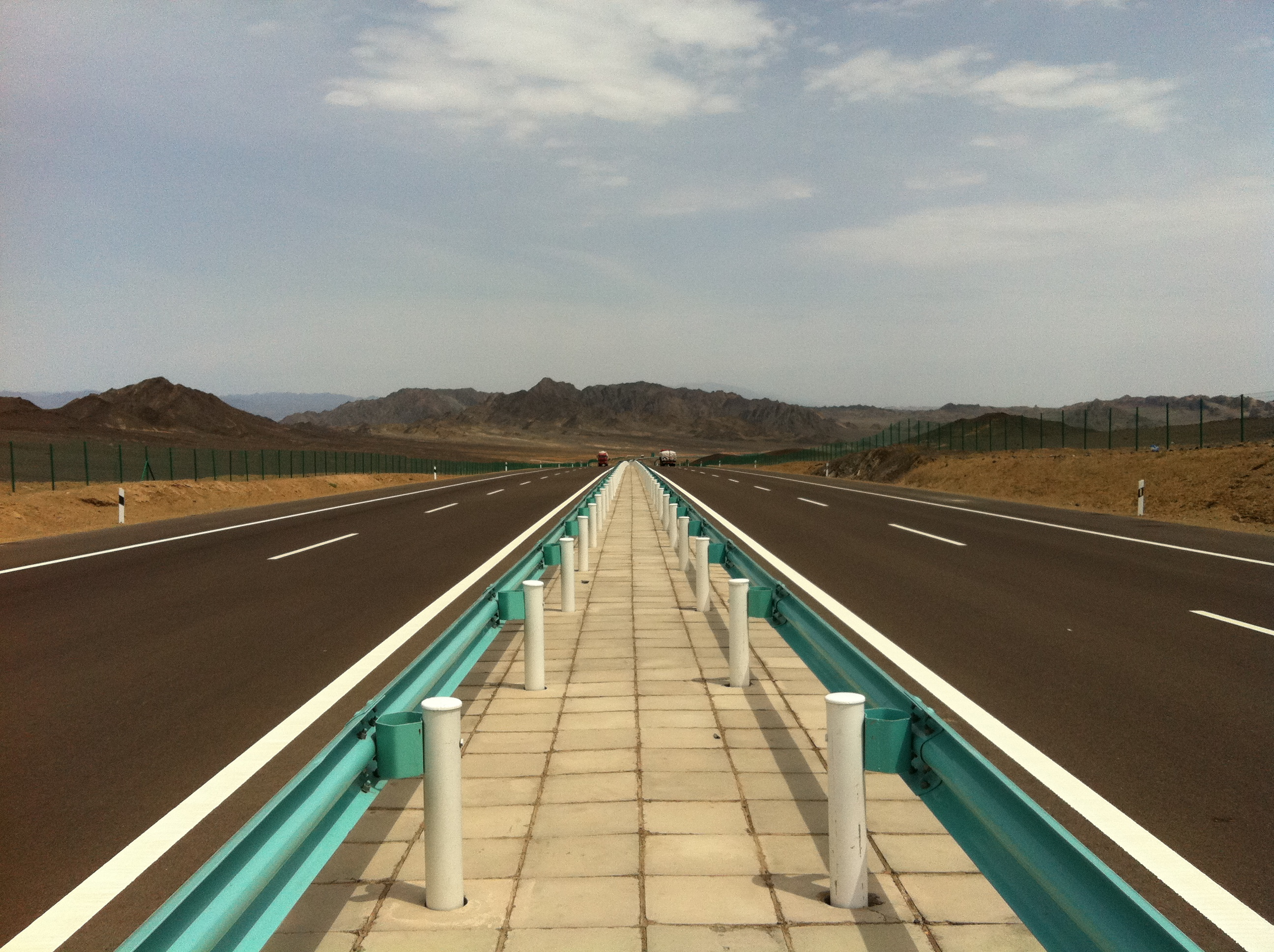 Highway G312 (G30) Xinjiang, China